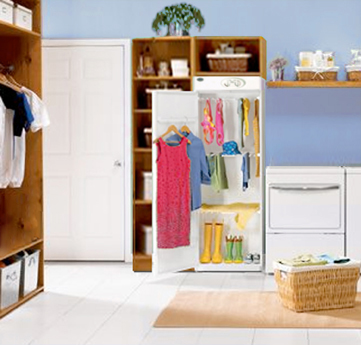 Buanderie pour particuliers